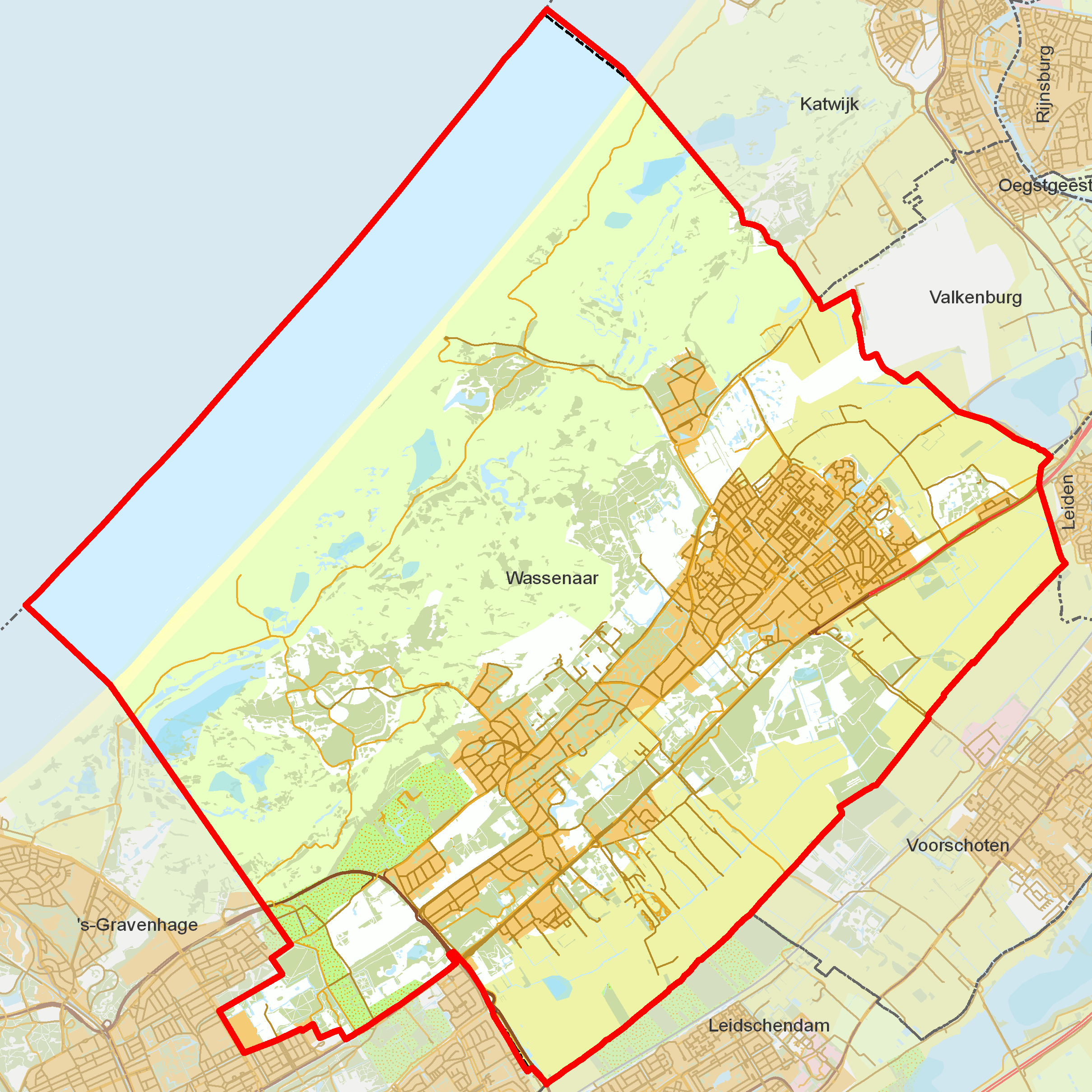 BAG woonplaatsen - Gemeente Wassenaar.png